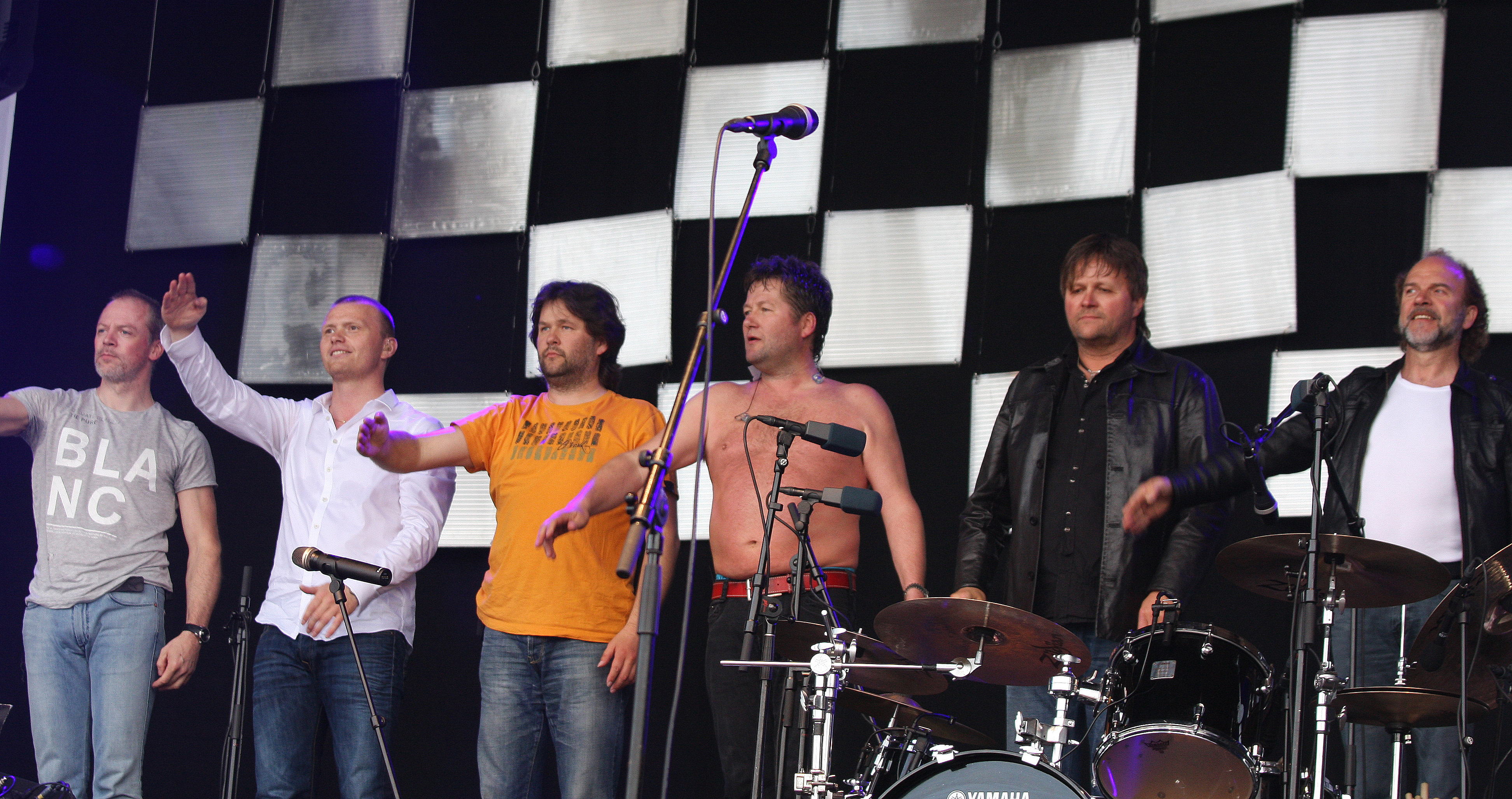 DDE